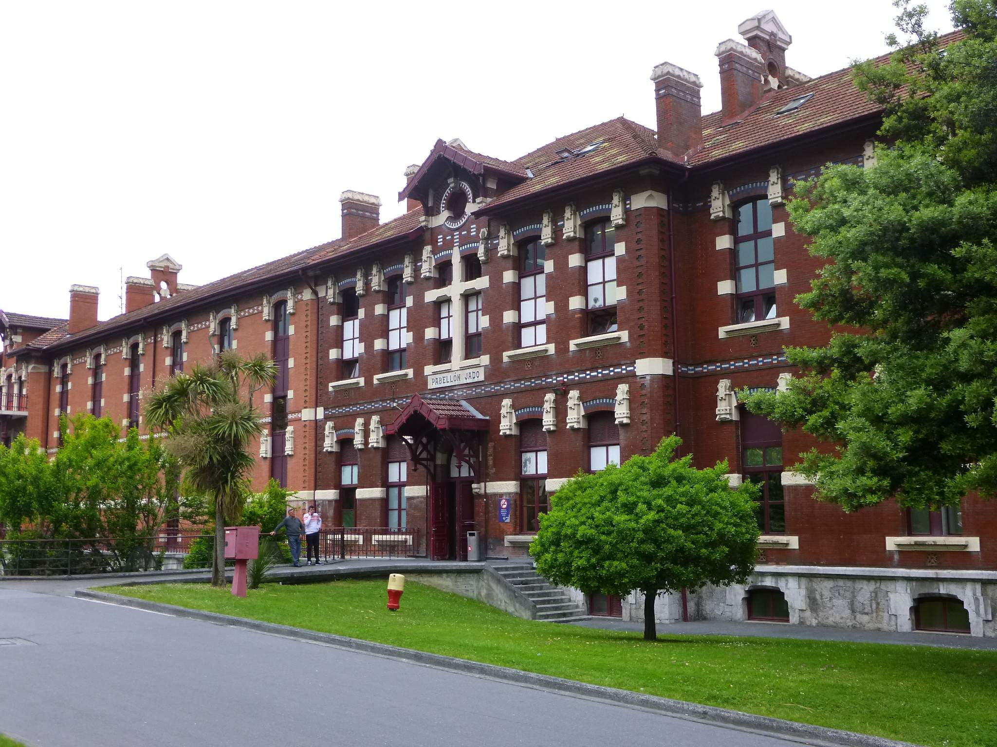 Hospital Universitario de Basurto (Bilbao)